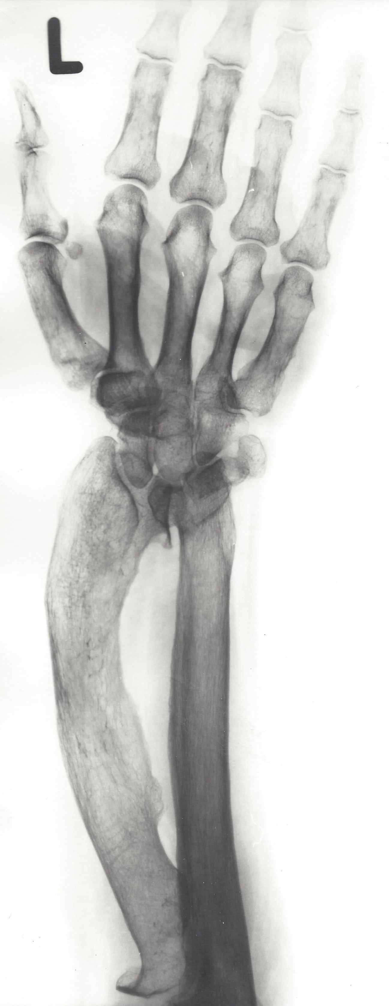 Röntgenaufnahme AP eines supinierten Unterams mit Madelung-Deformität